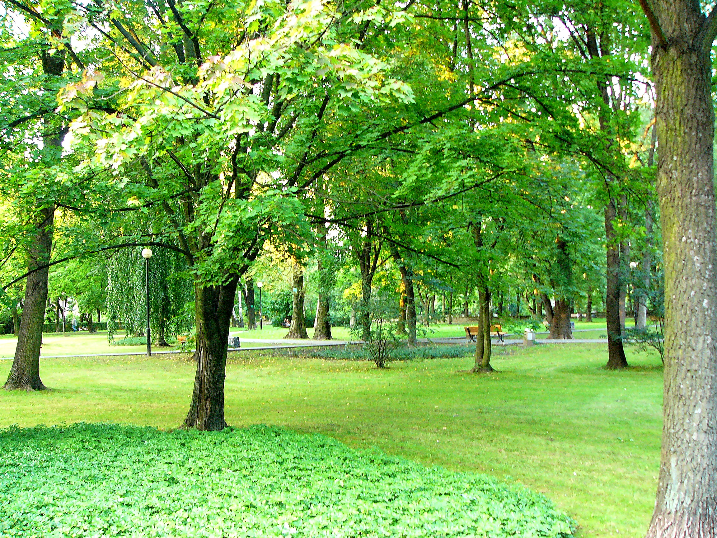 Gliwice, zieleń komponowana 05.2013 A/405/13 z 15.05.2013